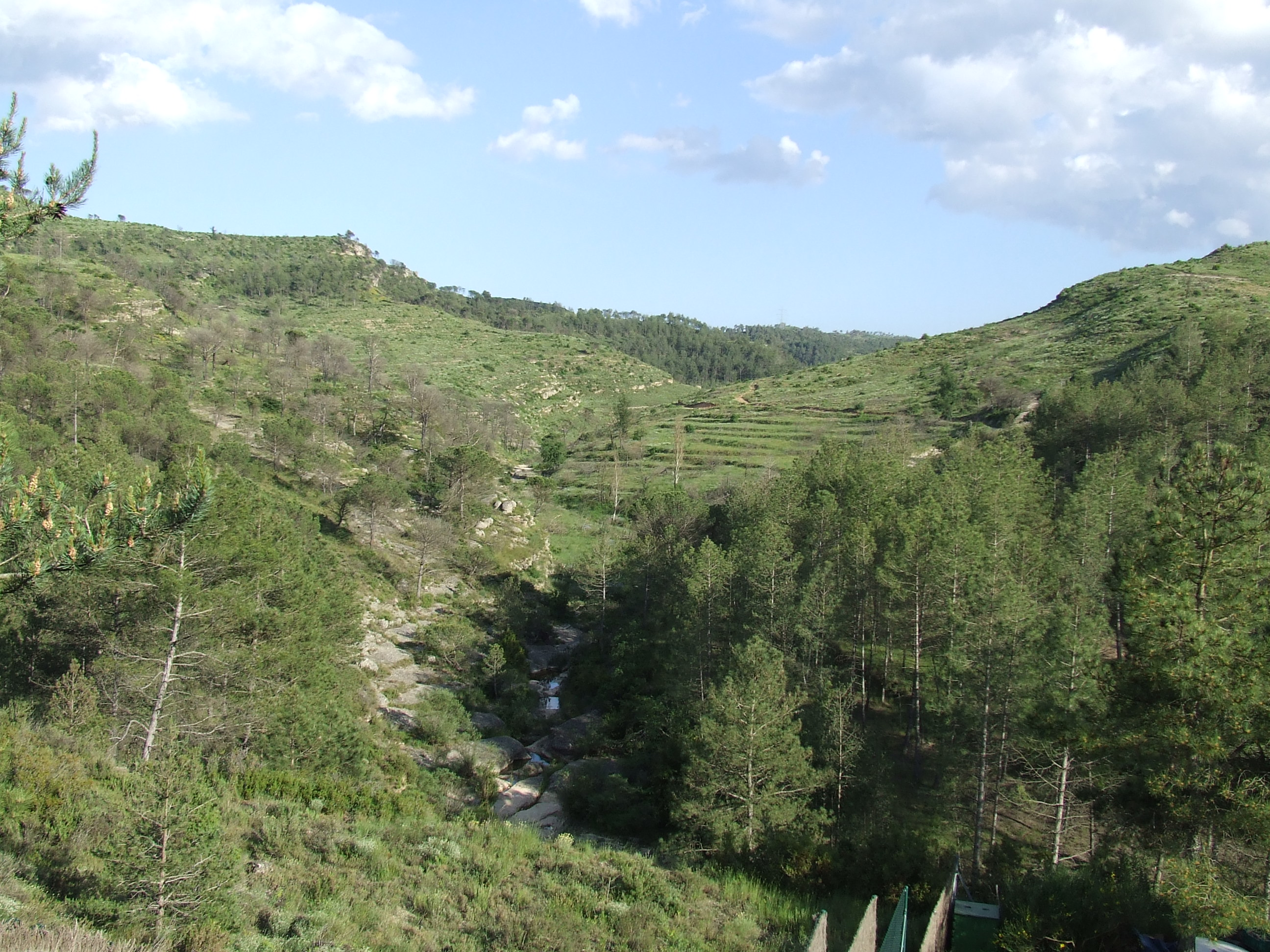 Torrent de l'Om (Monistrol de Calders, Moianès)